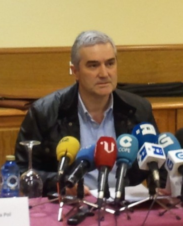 Fernando Blanco Álvarez, ex conselleiro de Industria da Xunta de Galicia.